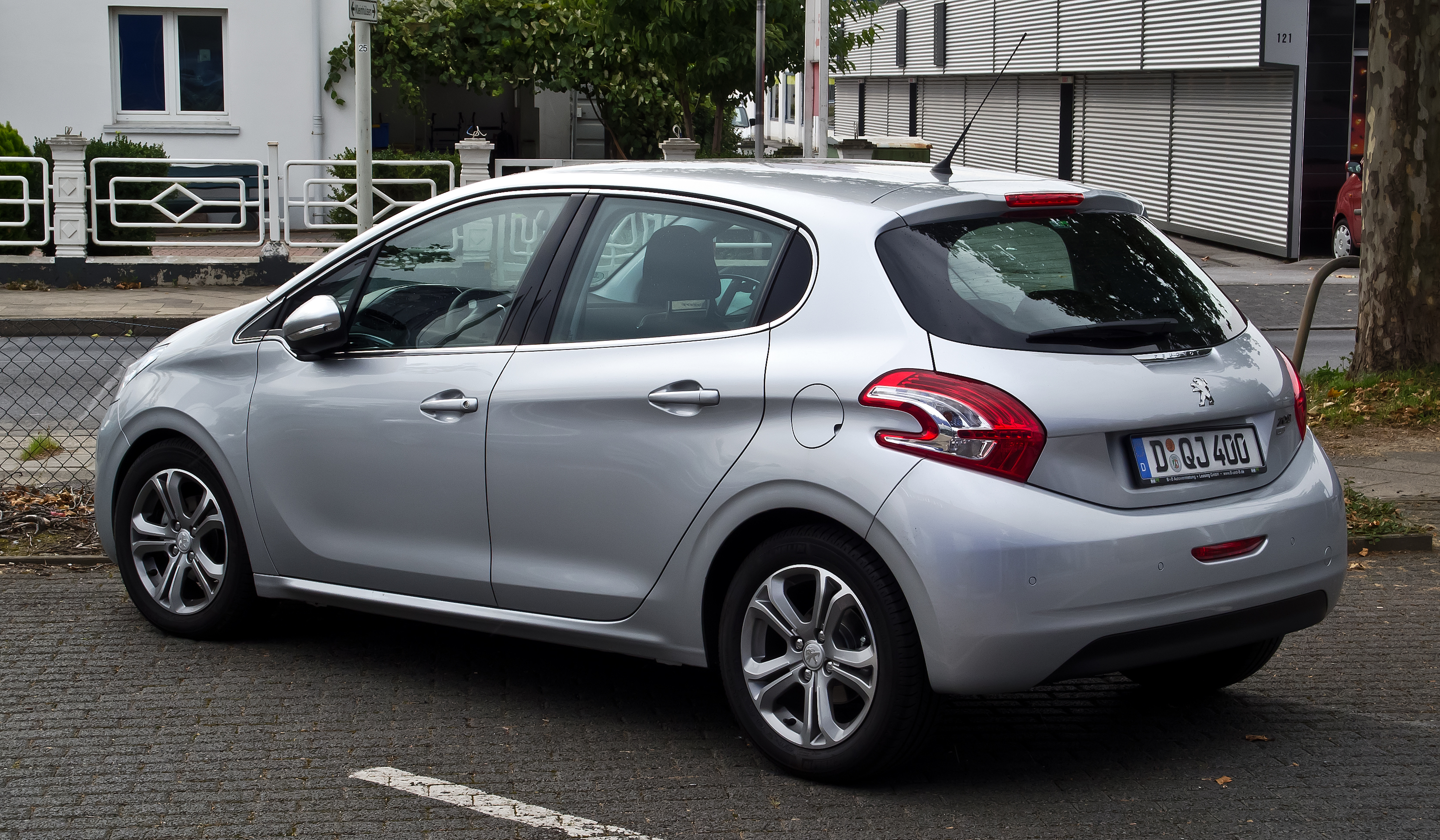 Peugeot 208 e-HDi FAP 115 Stop & Start Allure